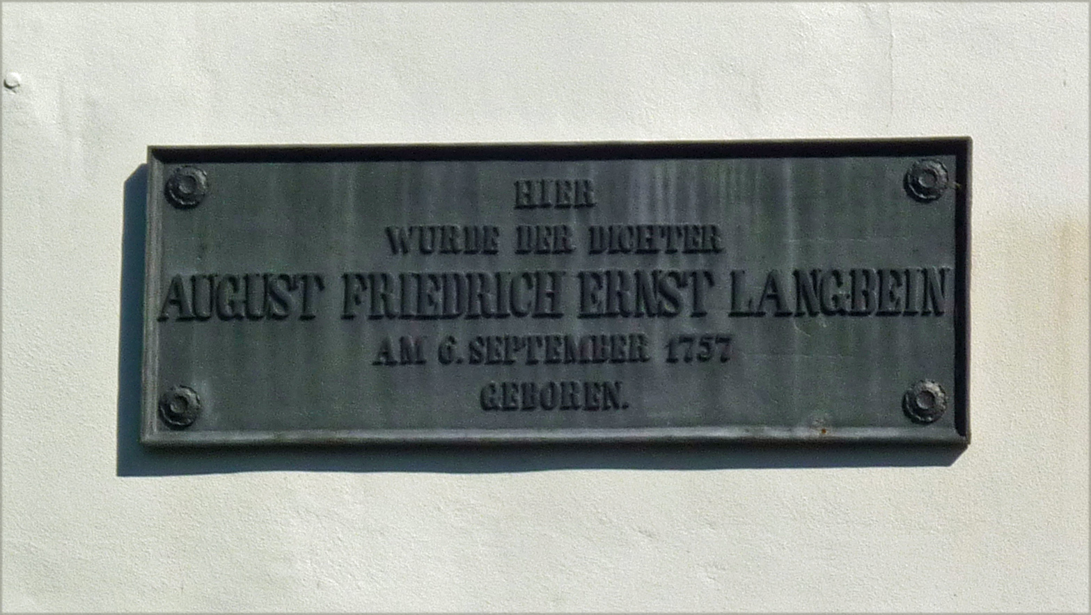 Radeberg: Schloss Klippenstein, Tafel zur Erinnerung an den Dichter August FRiedrich Ernst Langbein am Amtshaus